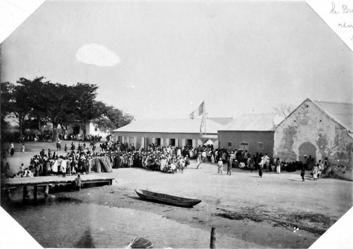 "A Kaolak : le Bour Saloum Semou rend visiteau "Richelieu", premier navire de cette importance ayant remonté le Saloum jusqu'à Kaolak (Sénégal) où il charge 400 tonnes d'arachides. A la douane de Kaolak". (15 phot. de la région du Saloum (Sénégal) en 1890, dont le navire Le Richelieu en rade de Kaolack. Don Pelet en 1928)